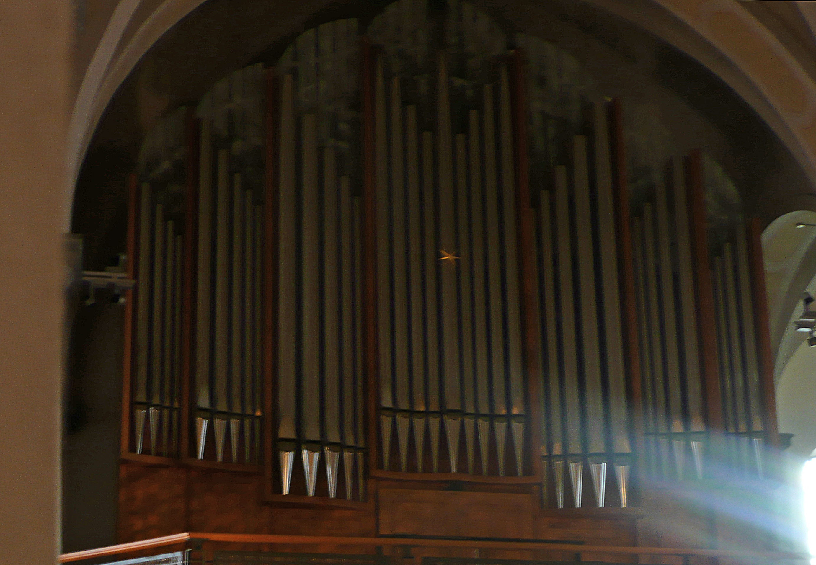 Eule-Orgel in der Kirche St. Sebastian, Würselen